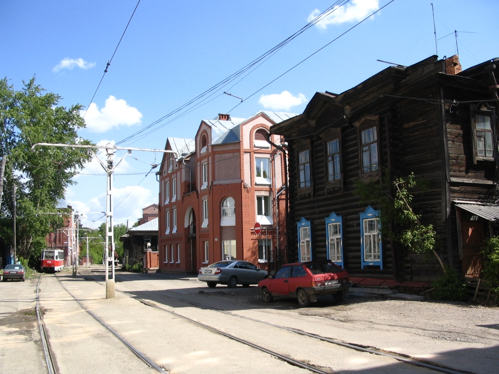 Пионерский переулок в Томске